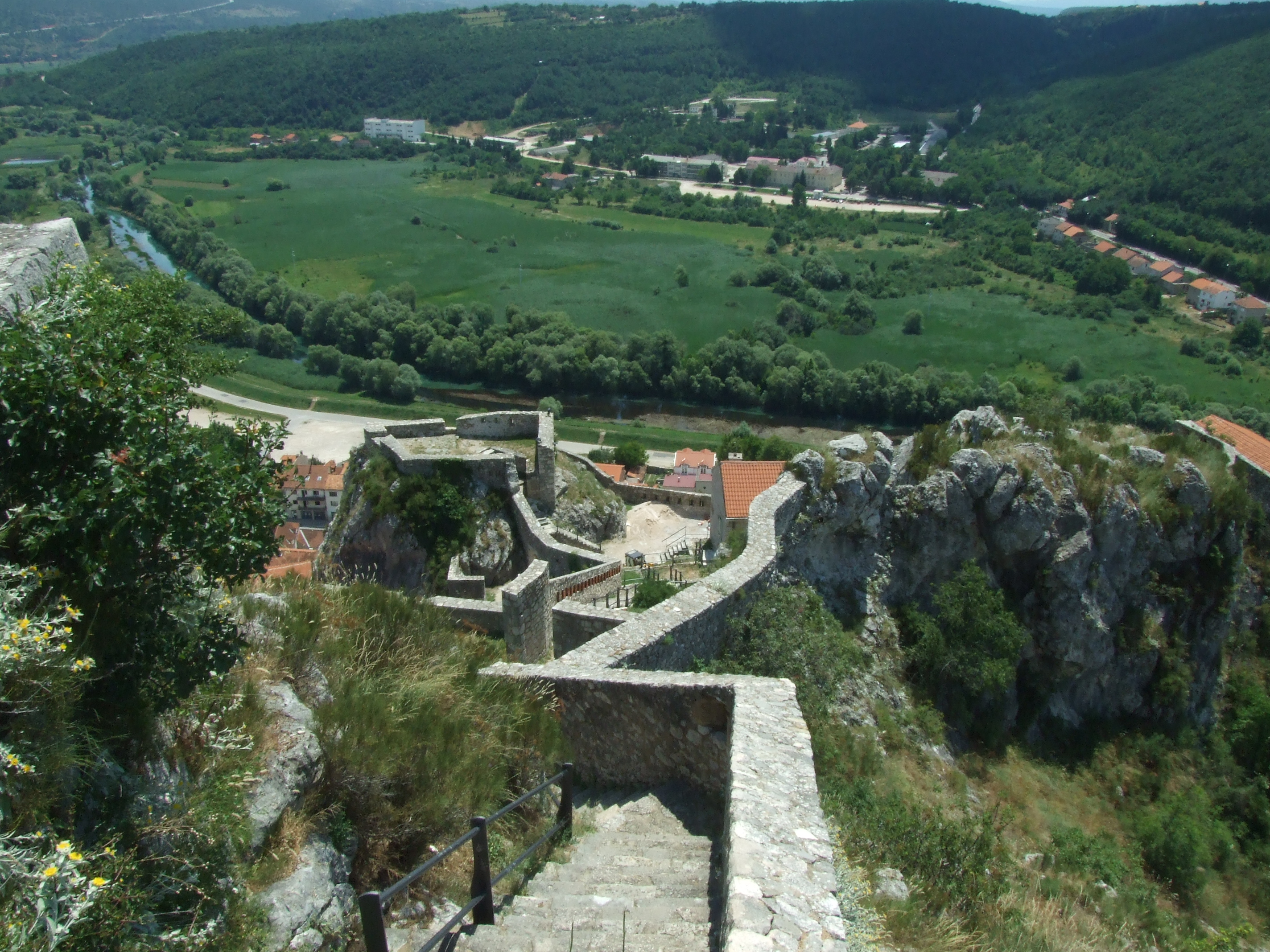 Kninska tvrđava u gradu Kninu. Na fotografiji su stube koje vode prema samom gradu. U pozadini se vidi rijeka Krka. Fotografirano 3. srpnja 2010.